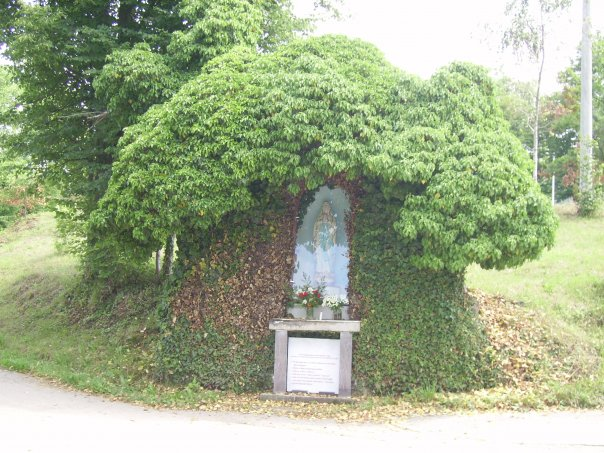 Završje Netretićko - Kapelica Blažene Djevice Marije